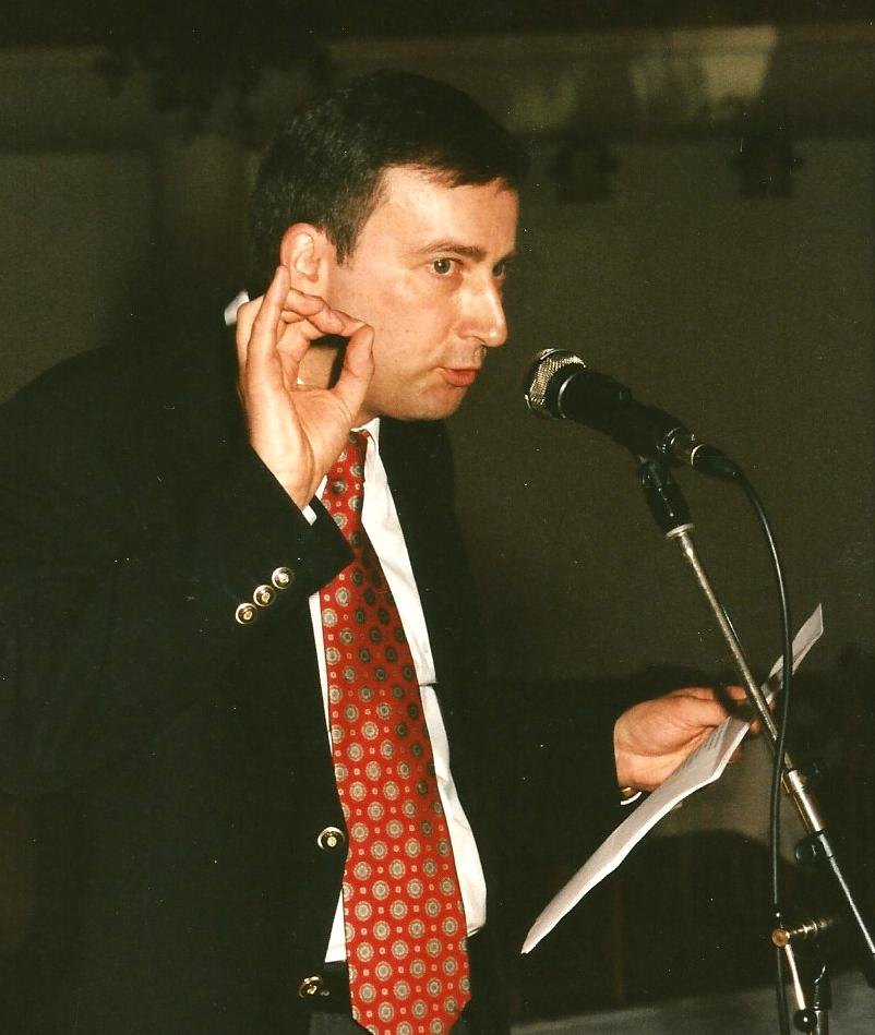 Conferenza-Idomeneo 1998